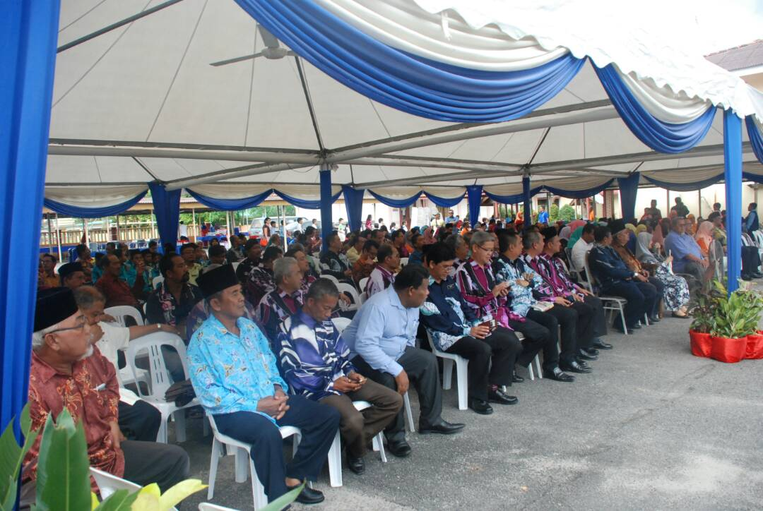 Tetamu jemputan